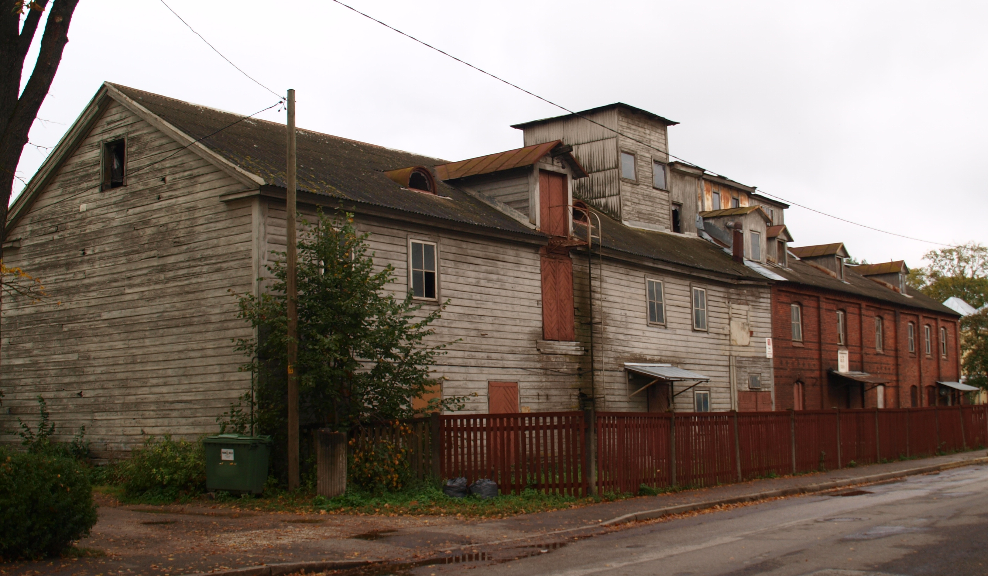 Tööstushoone Tartus Tiigi 61a, 1886.a.